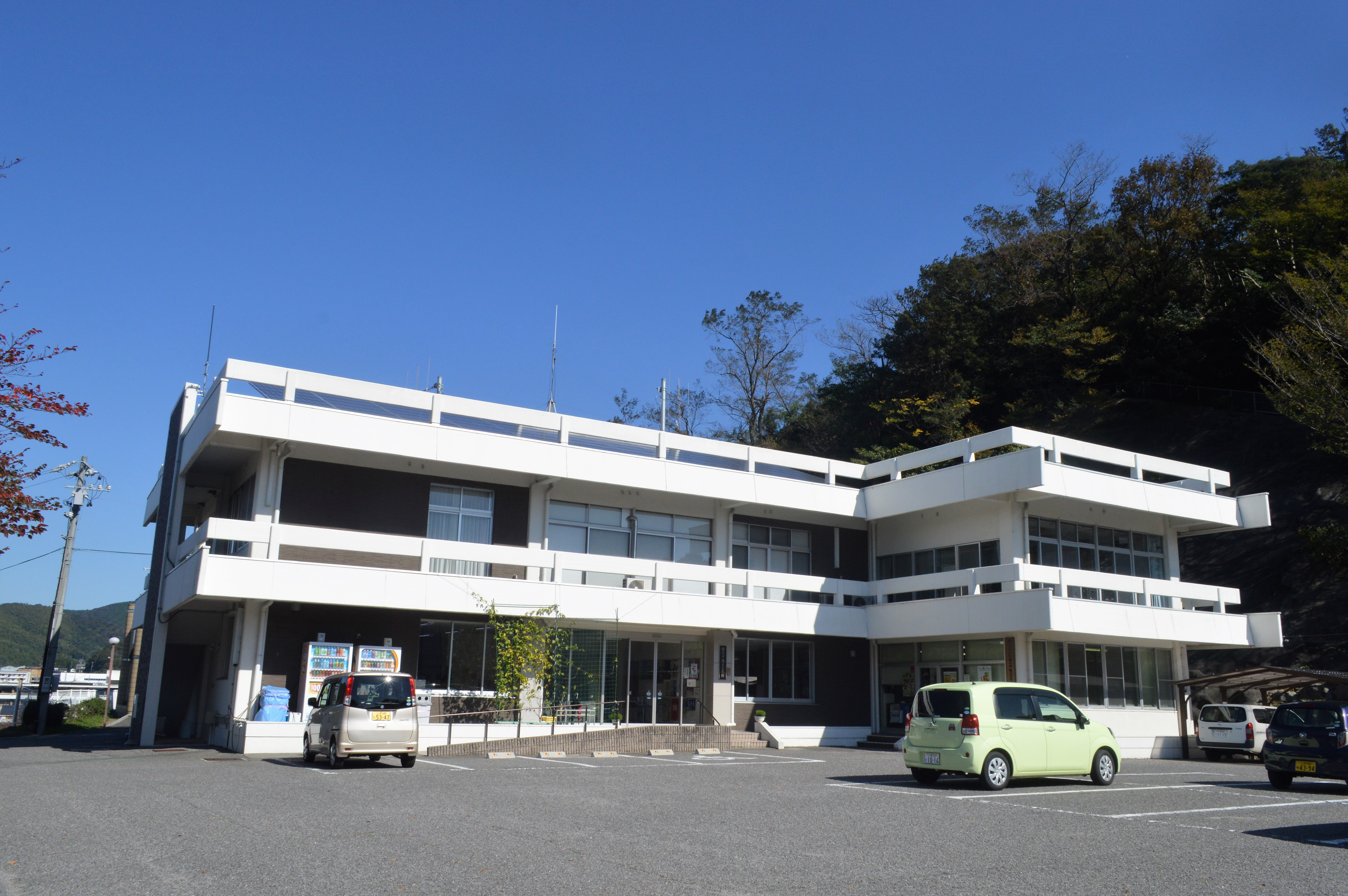 愛知県西尾市の西尾市幡豆公民館。